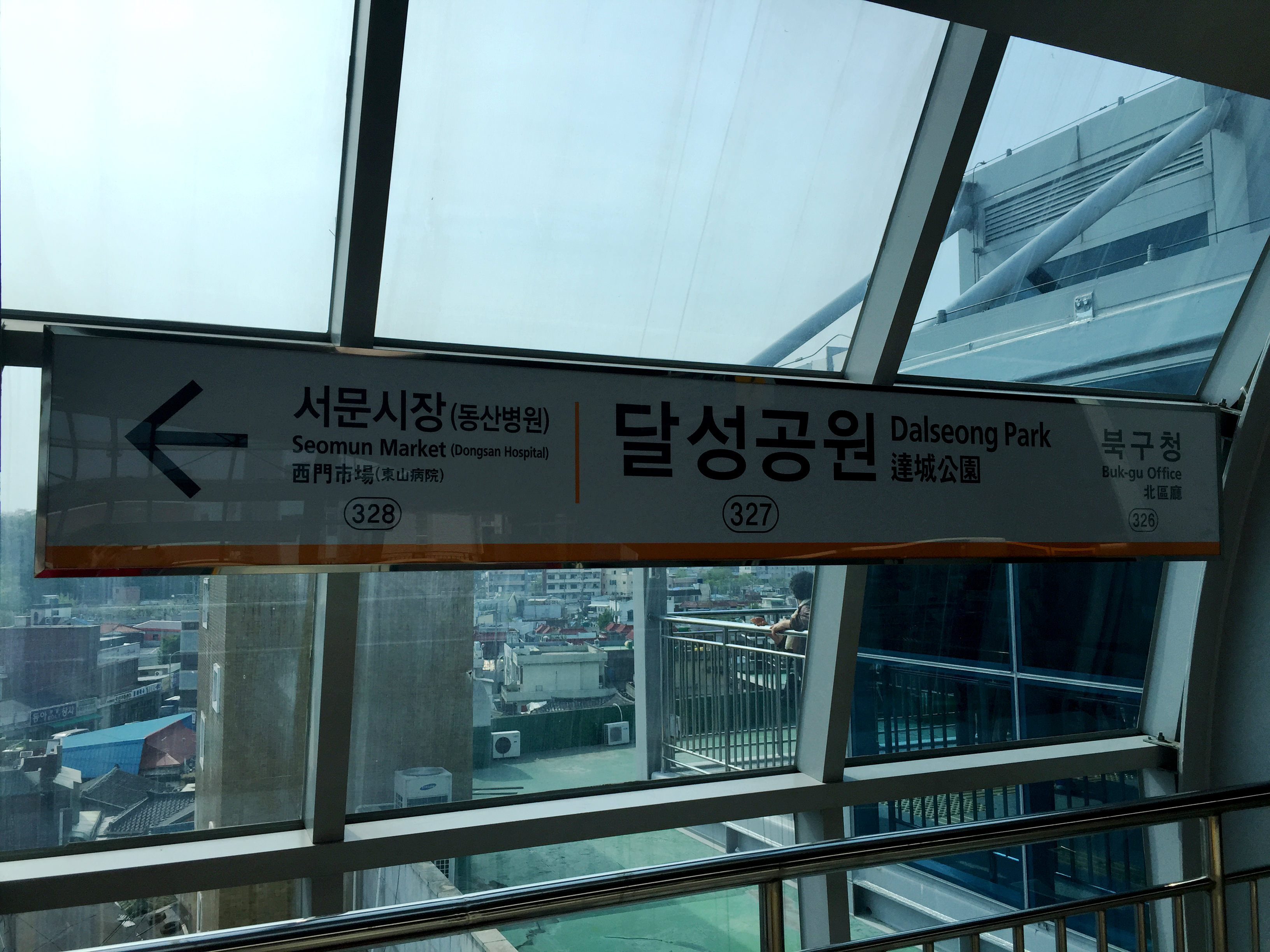 달성공원역 역명판